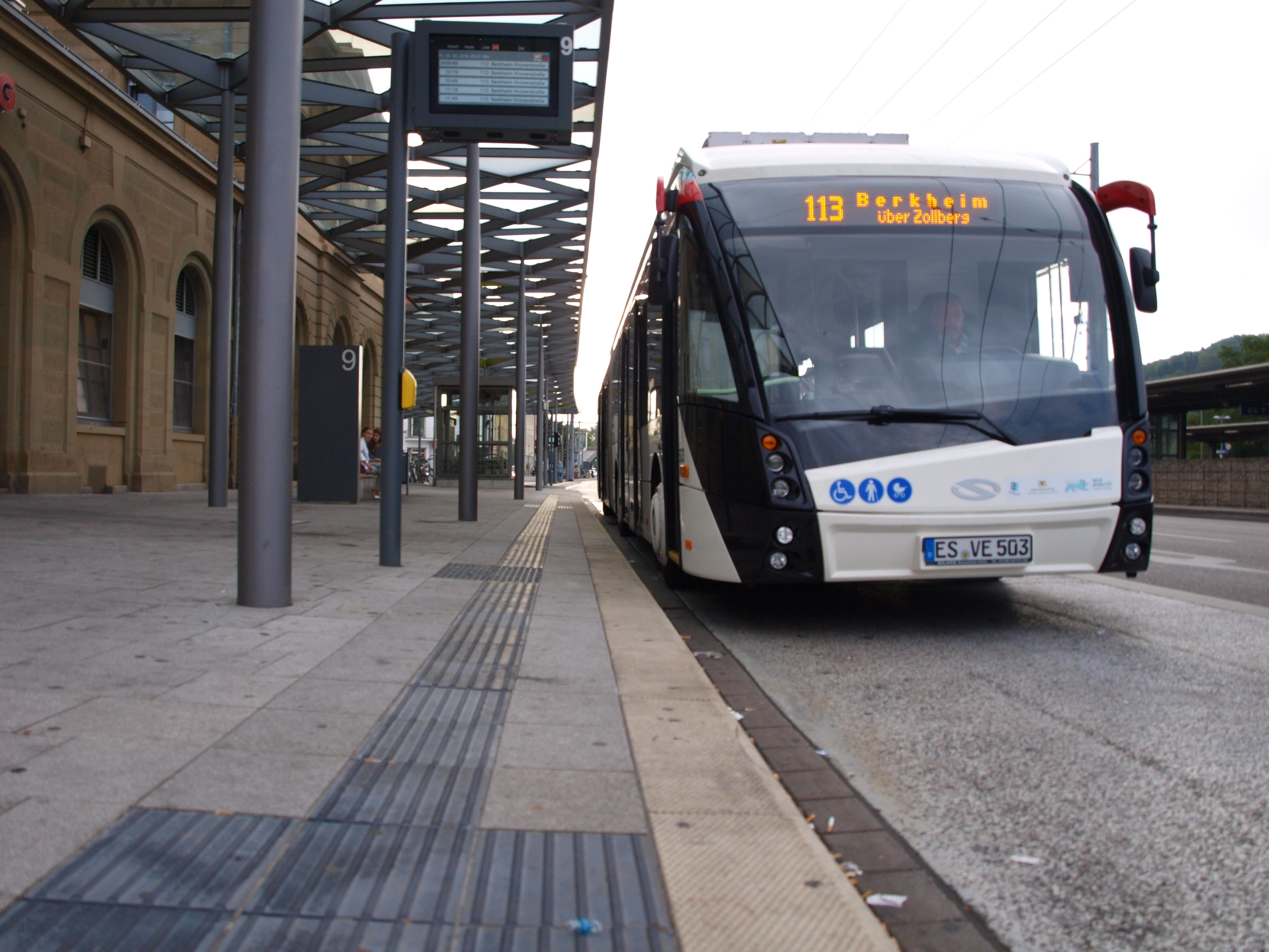 Solaris Trollino in Metro Style